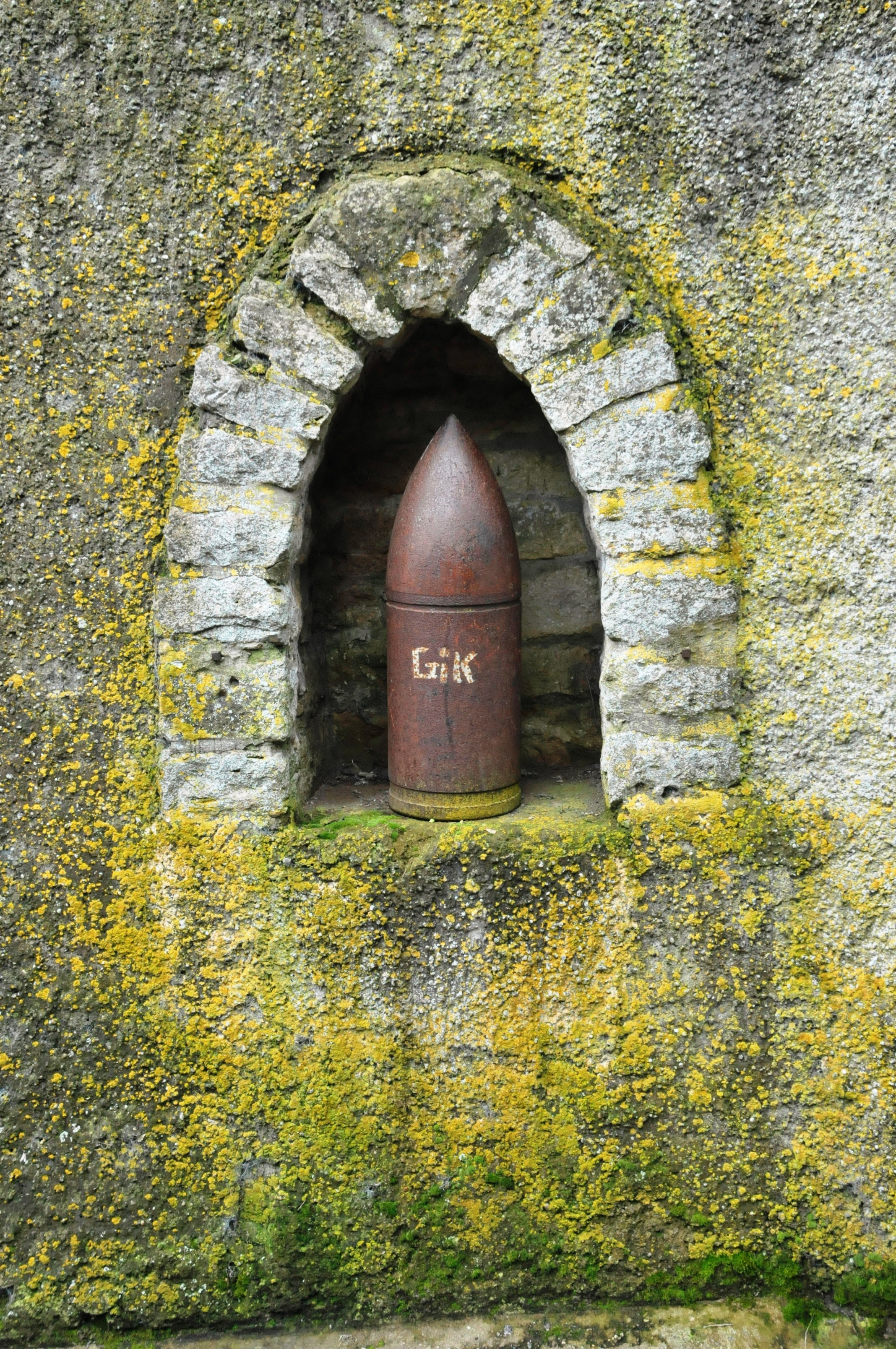 Breisach am Rhein, Gedenkgranate in der Eckartsberg-Mauer